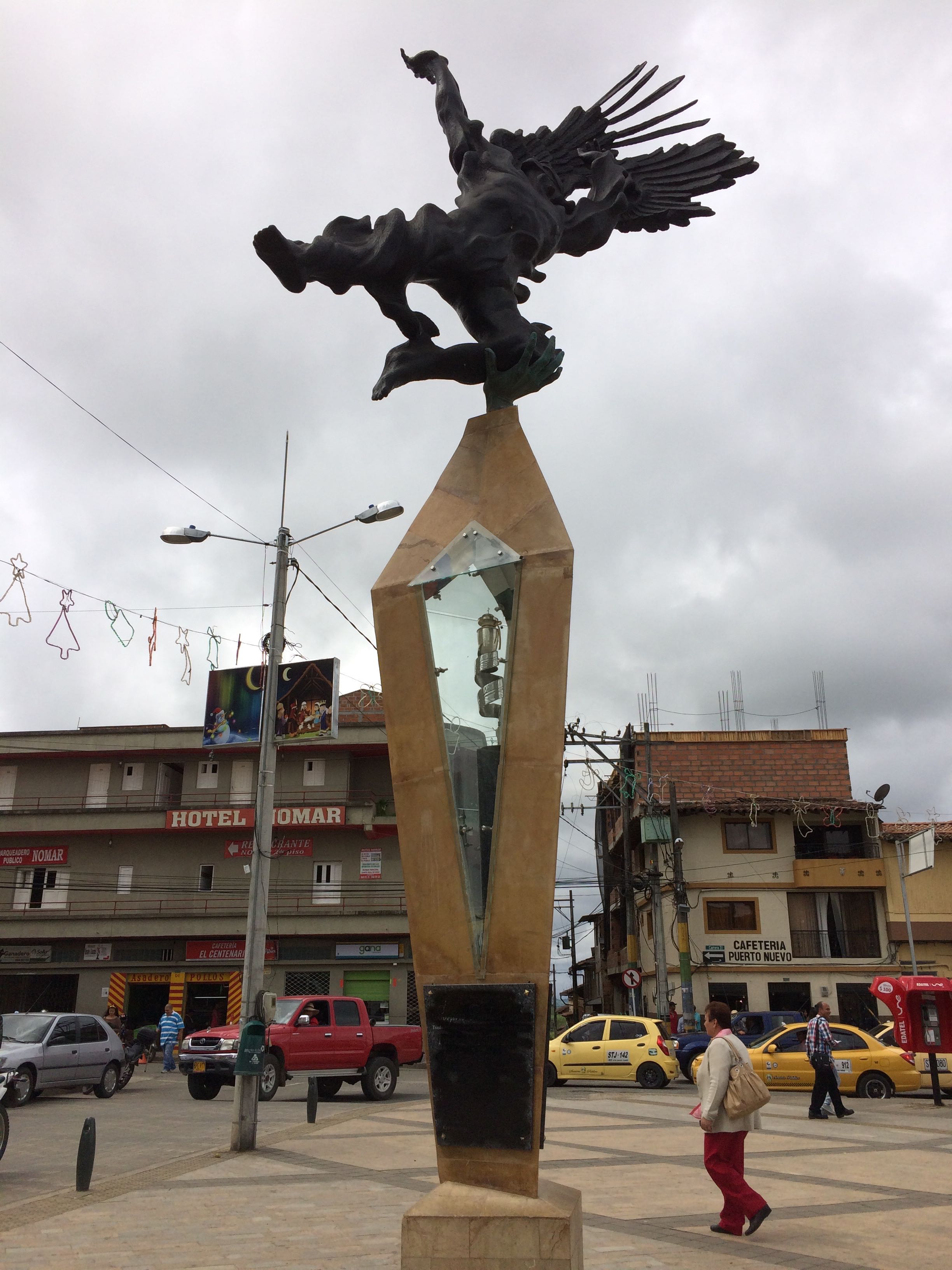 SANTA ROSA DE OSOS ANTIOQUIA - MONUMENTO A PORFIRIO BARBA JACOB (POETA) Esta fotografía fue tomada en el municipio colombiano con código 05686.